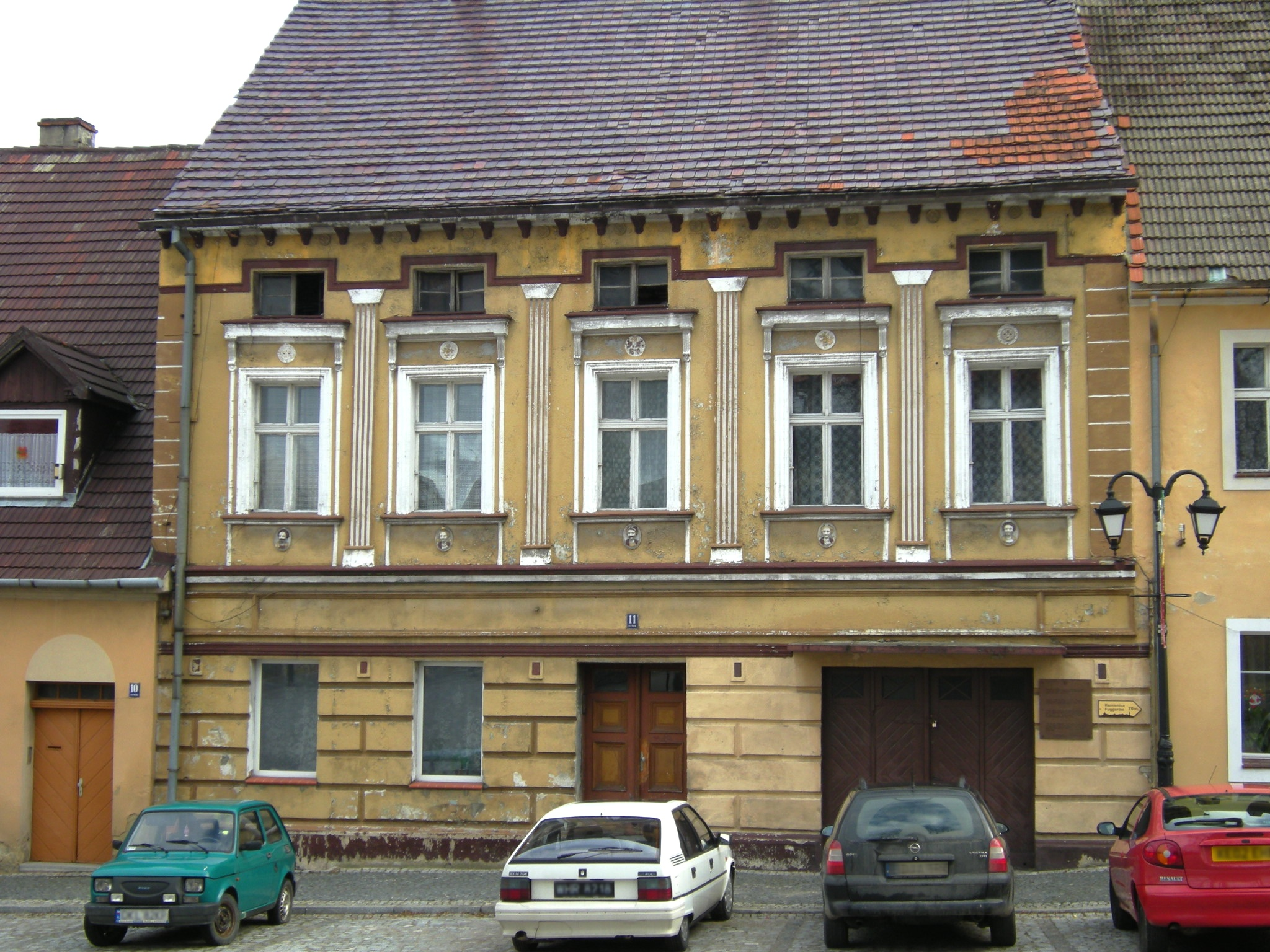 Kamienica gotycka z XV wieku, przebudowywana ... Adres: Złoty Stok, Rynek 11